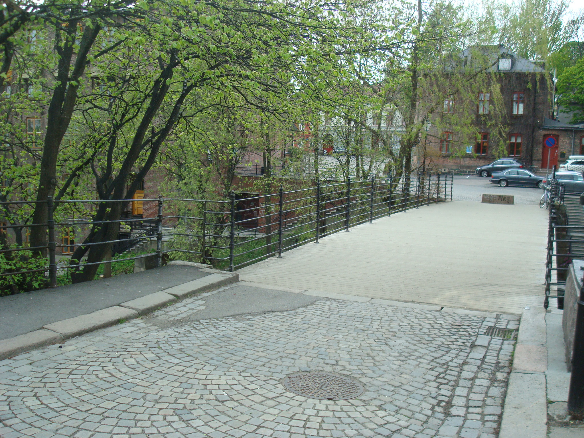 Beierbrua i Oslo (2014).